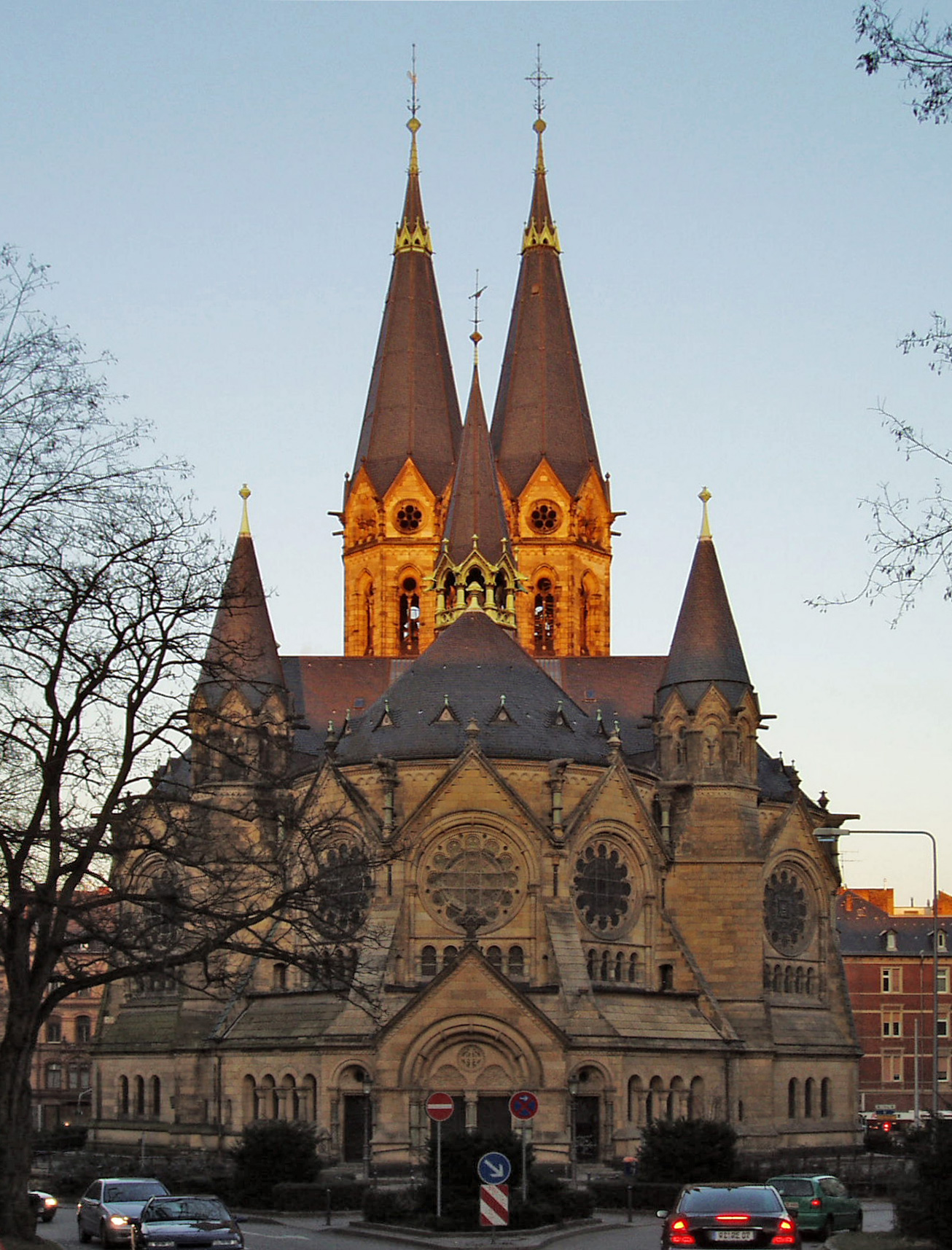 Die 1894 erbaute evangelische Ringkirche in Wiesbaden - Ansicht von Westen mit Haupteingang. Die Kirche ist die erste überhaupt, die nach den Grundsätzen des Wiesbadener Programms gebaut wurde.